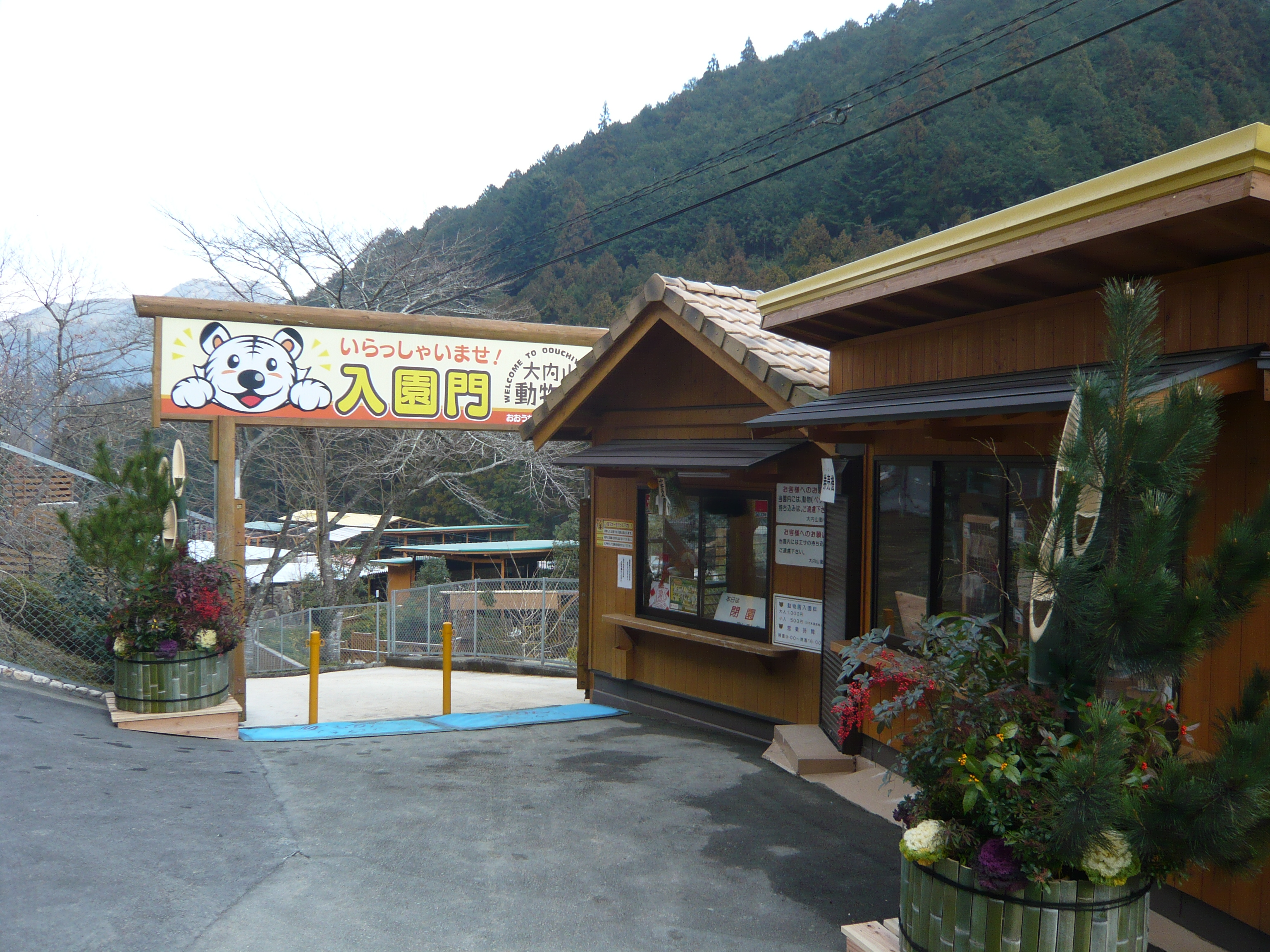 大内山動物園園内